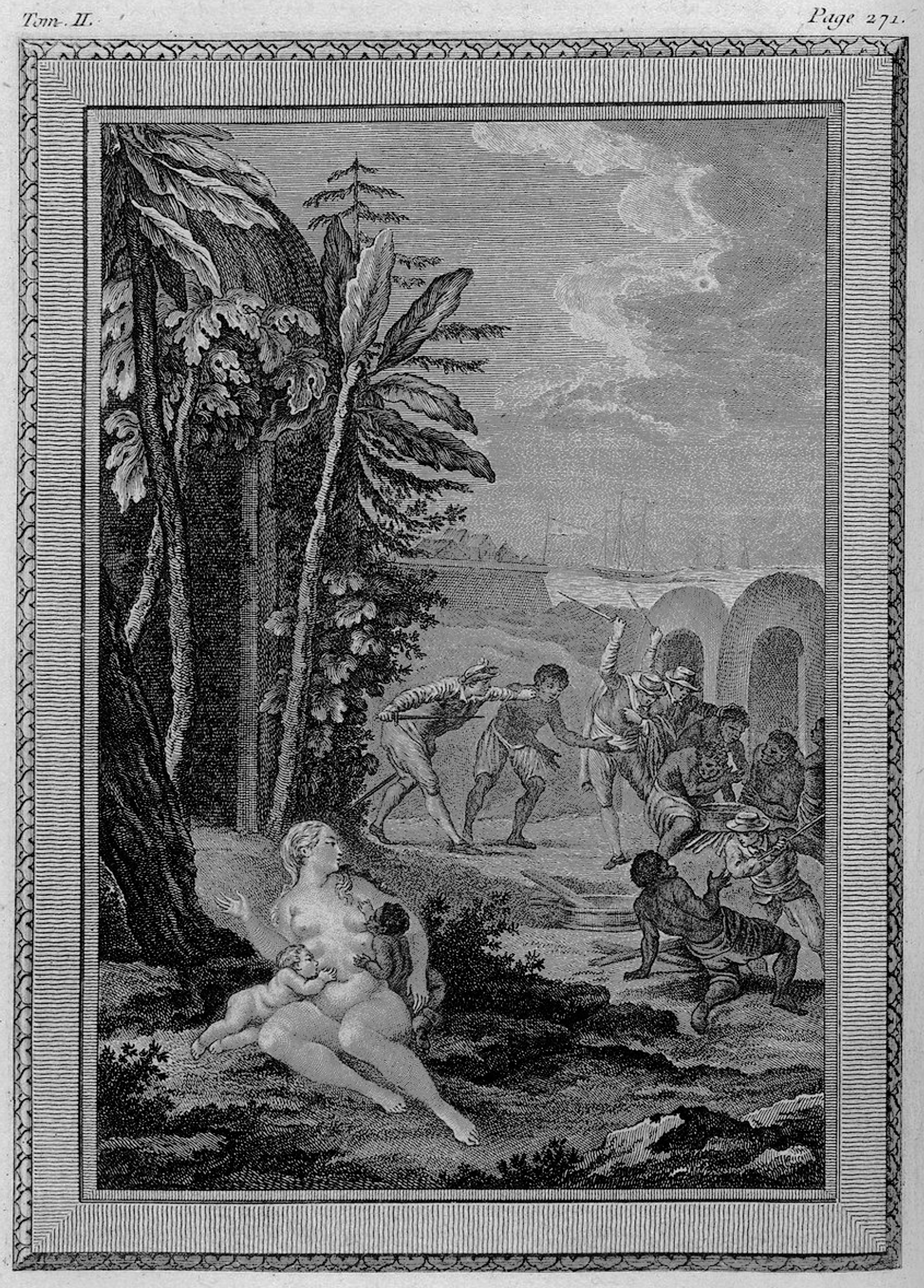 Personnification de la Nature qui nourrit avec le même amour un enfant blanc et un enfant noir. Esclaves travaillant dans une sucrerie. Illustrations de Marillier, dessinateur pour Guillaume Thomas Raynal.- Histoire philosophique et politique des deux Indes, Volume 2. Pl. en regard de la page 271, 1775.